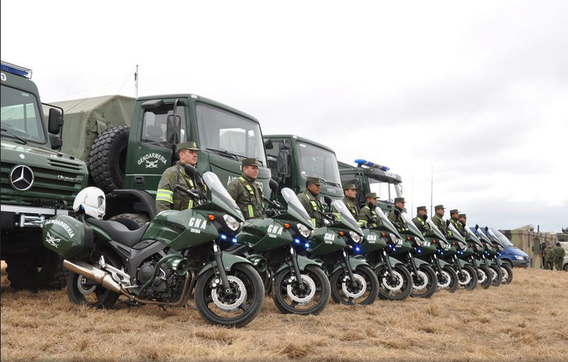 El Gobierno prorrogó hasta el 31 de diciembre de 2016 el Operativo Escudo Norte, que apunta a incrementar la vigilancia y el control de las fronteras noreste y noroeste del país para combatir el tráfico ilícito de drogas, la trata de personas y el contrabando. El Operativo Escudo Norte es el plan de vigilancia y control del espacio terrestre, fluvial y aéreo del país que fue creado por decreto en julio de 2011 y desde entonces fue extendido. Su objetivo es “incrementar la vigilancia y el control del espacio terrestre, fluvial y aéreo de jurisdicción nacional en las fronteras noreste y noroeste de la República Argentina, así como la aprehensión y la puesta a disposición de las autoridades judiciales de quienes crucen las fronteras de manera ilegal”.